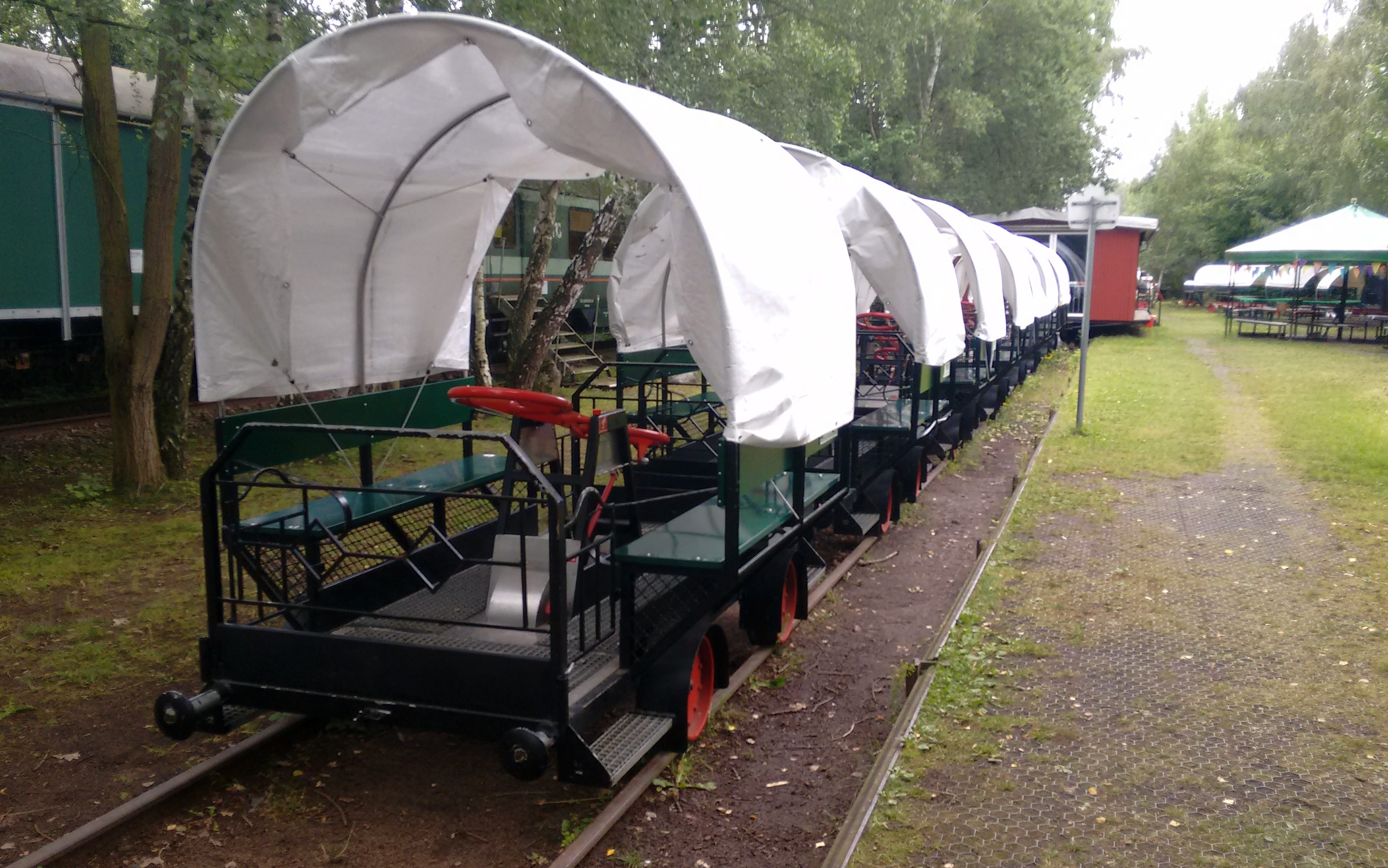 Draisinen der Erlebnisbahn Ratzeburg am Standort Schmilau